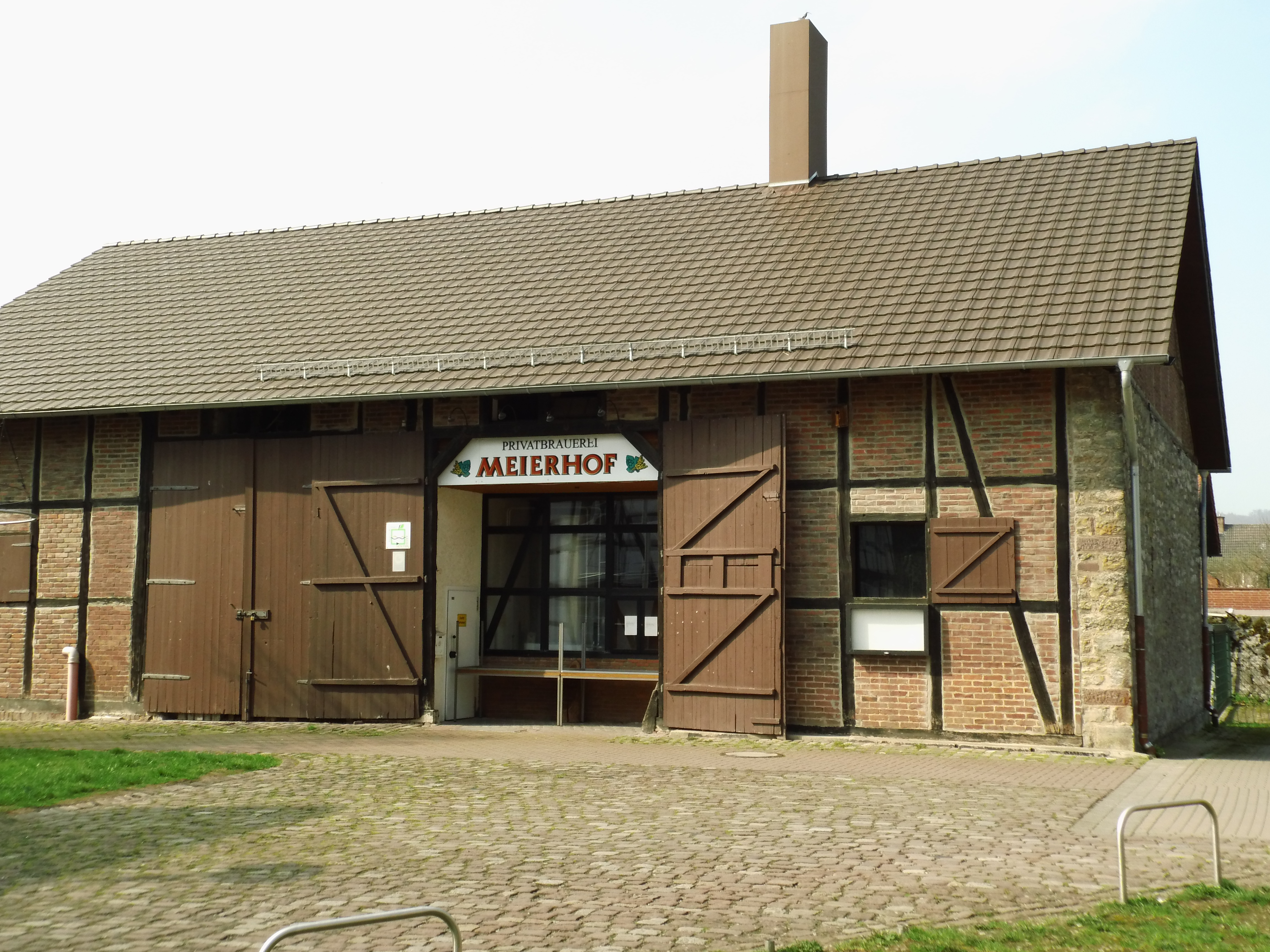 Baudenkmal, Liste der Baudenkmäler in Höxter Nr. 337